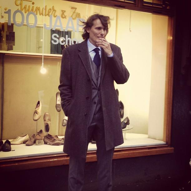 Martijn Hesseling